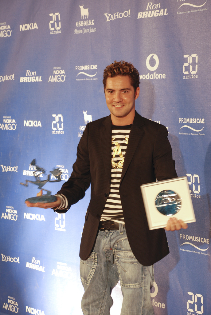 Premios Nokia Amigo 2007, El Informador Digital.